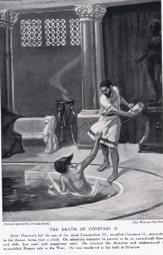 Incisione creata da Watson Charlton (1872) per la casa editrice Hutchinson, nel libro Hutchinson's History of the Nations (1920)